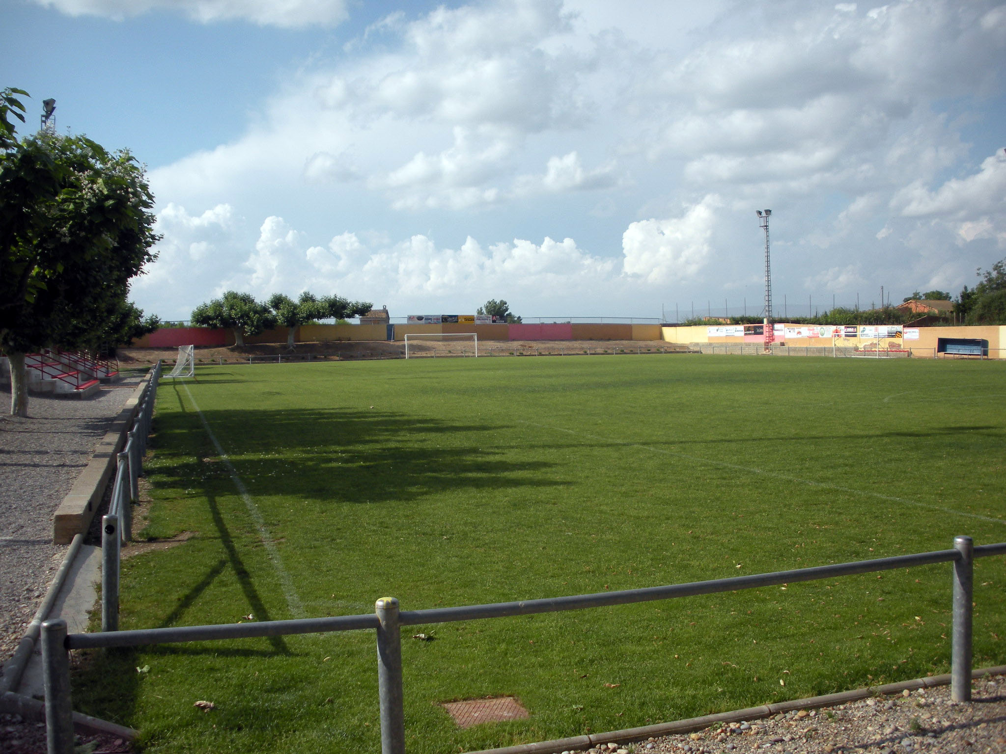 Camp de futbol de Juneda